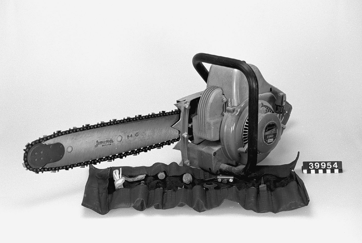 Svärdet är märkt Jonsereds 64G. I nyskick vid förvärvet. Med verktygssats och reservdelar i väska. Tillbehör: Komplett svart verktygssats med verktyg och reservdelar.